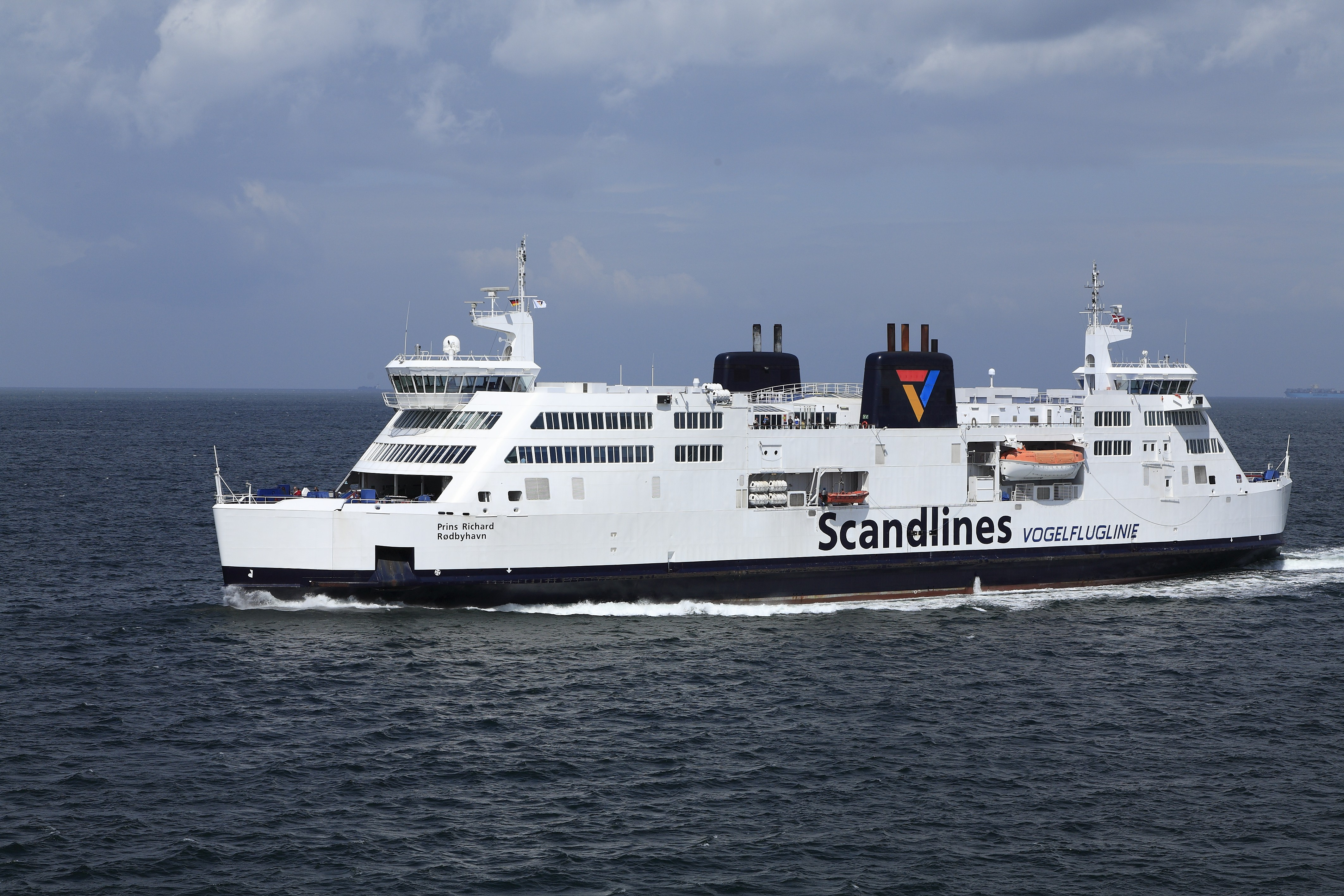 südgehend Richtung Puttgarden